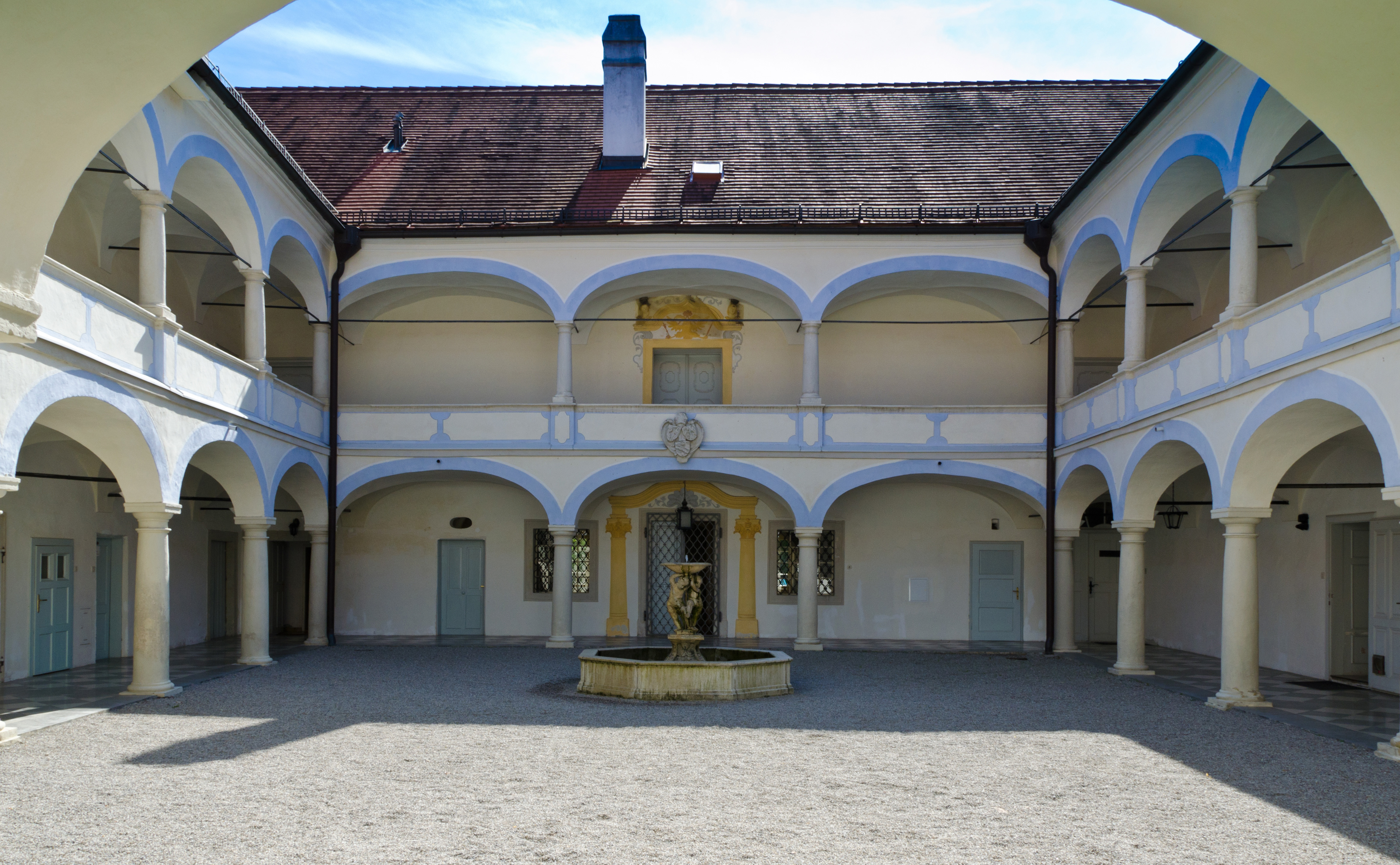 Pfarrhof mit Kapelle hl. Martin (Pfarrhofkirche) und Gartenbaudenkmalen